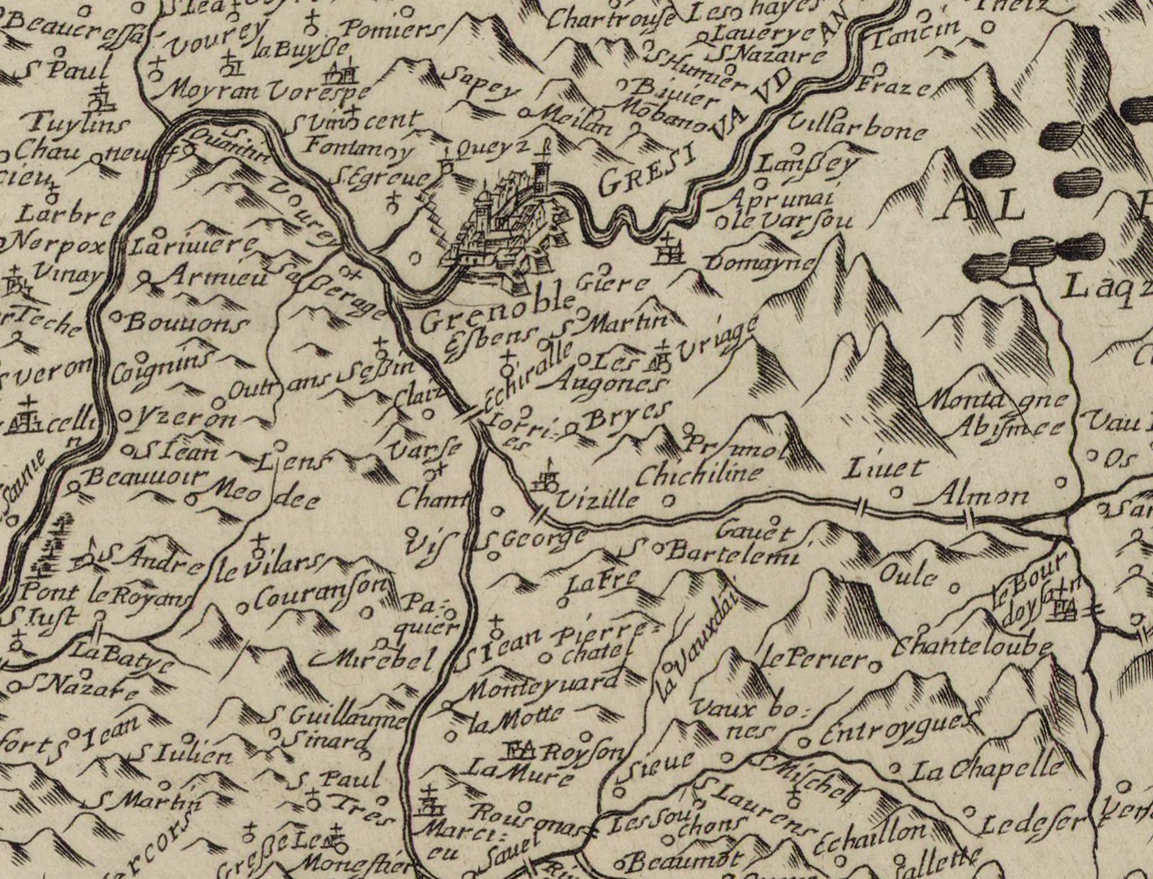 détail de la carte de Jean de Beins (1577-1651), Carte et description générale de Dauphiné avec les confins des pais et provinces voisines, le tout racourcy et réduict ; Éditeur Nicolas Berey (1610?-1665), Paris, 1654 . Reproduction partielle depuis Gallica de la Bibliothèque nationale de France Échelle(s) : Lieües de France commune 9 [=Om, 08 ; 1:615 000 environ]